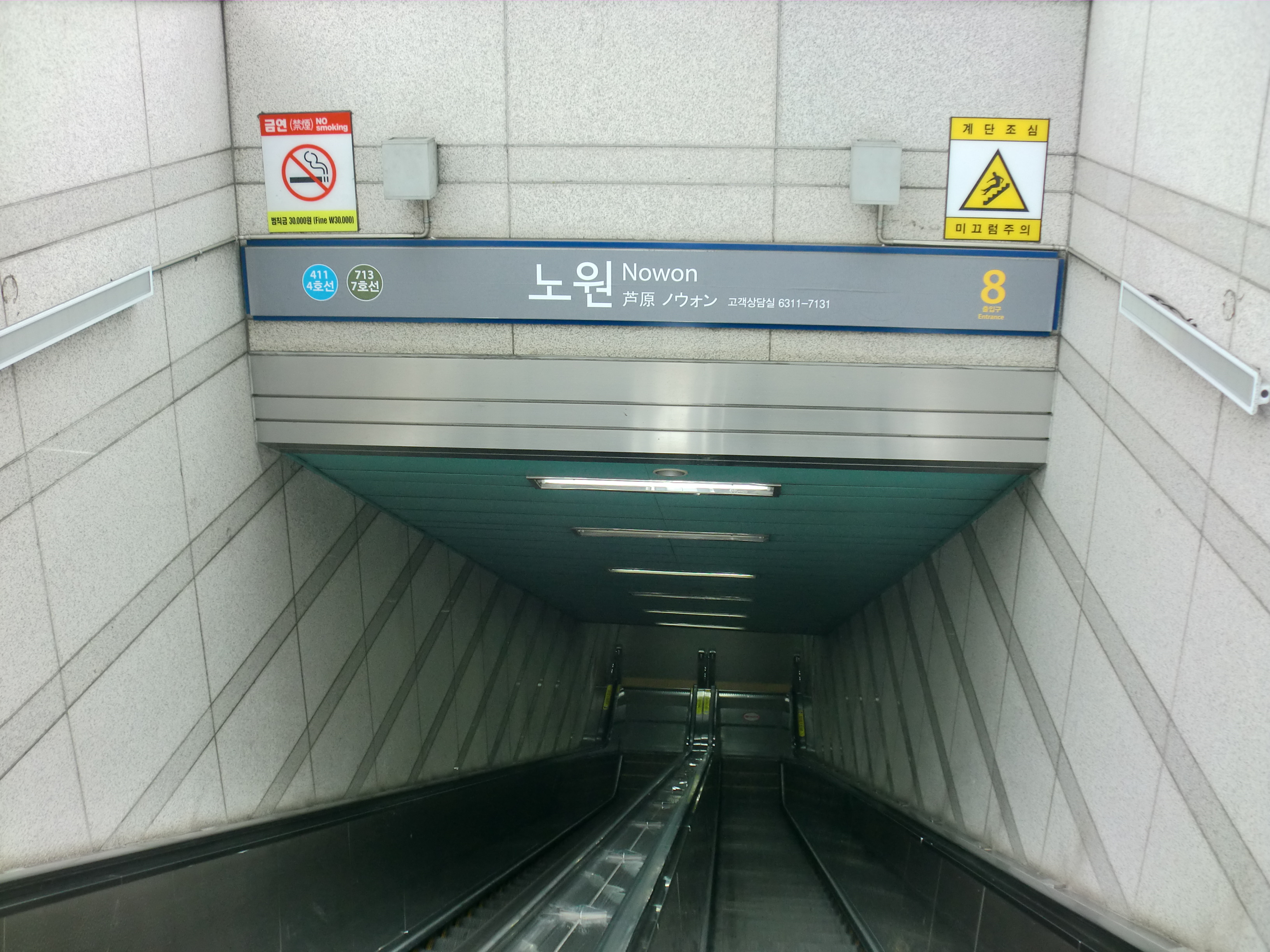 노원역 8번출입구